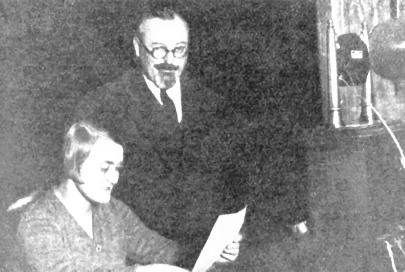 Lidja Zamenhof kaj Émile Borel antaŭ radiomikrofono en Liono, 1935.